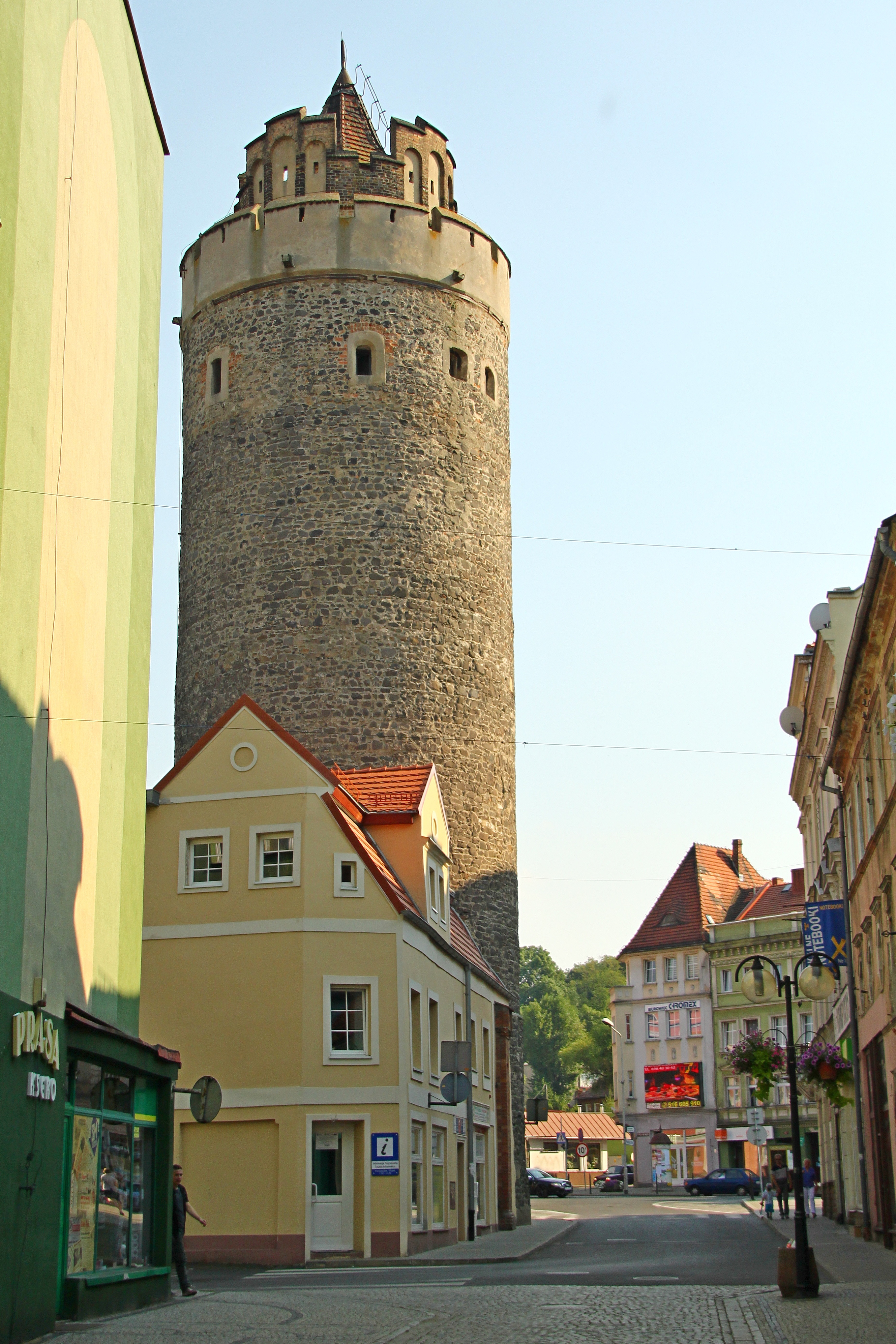 Lubań, wieża obronna Bracka, XIV